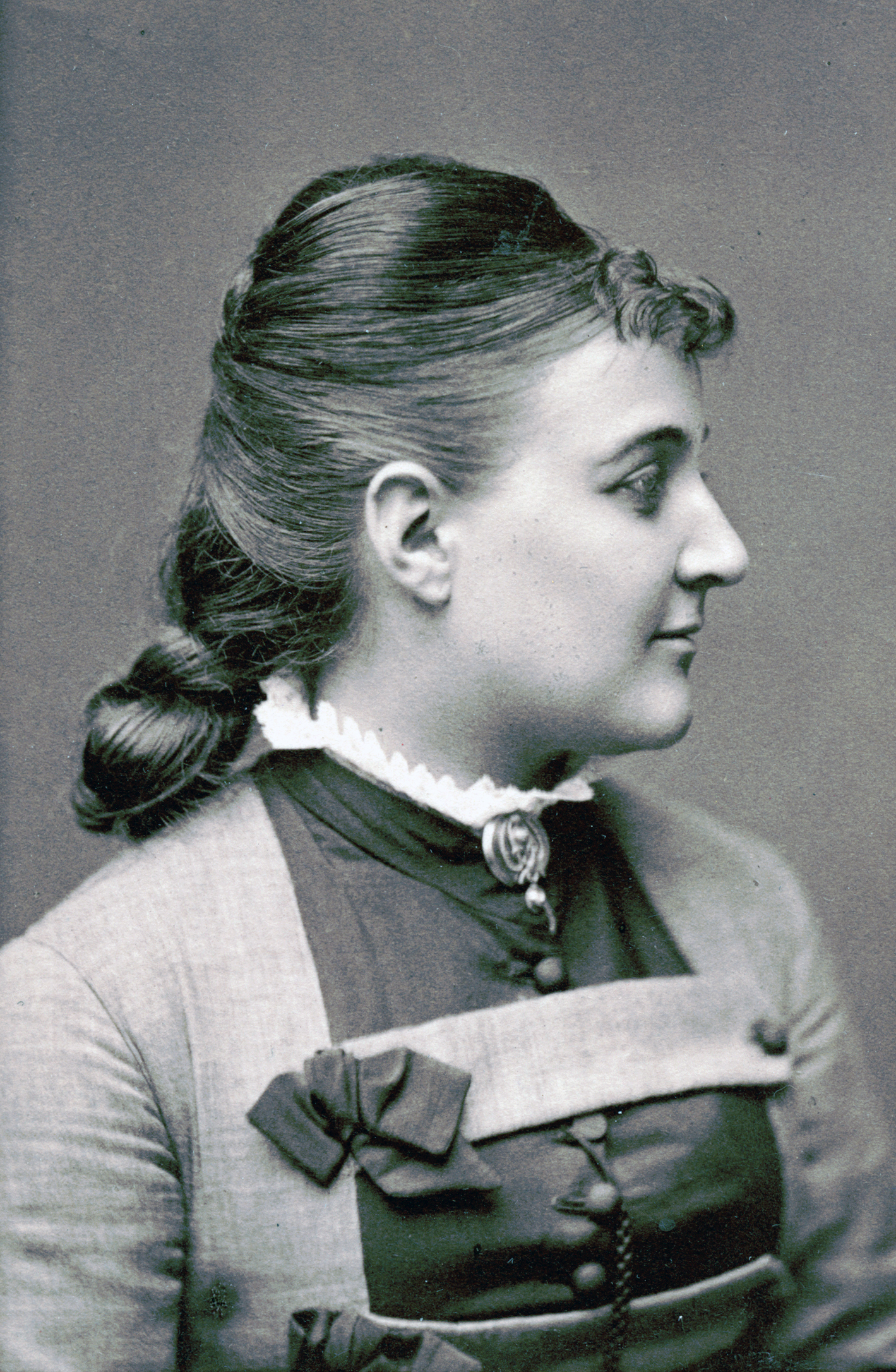 Virginia Paban, skådespelare vid Södra teatern 1883